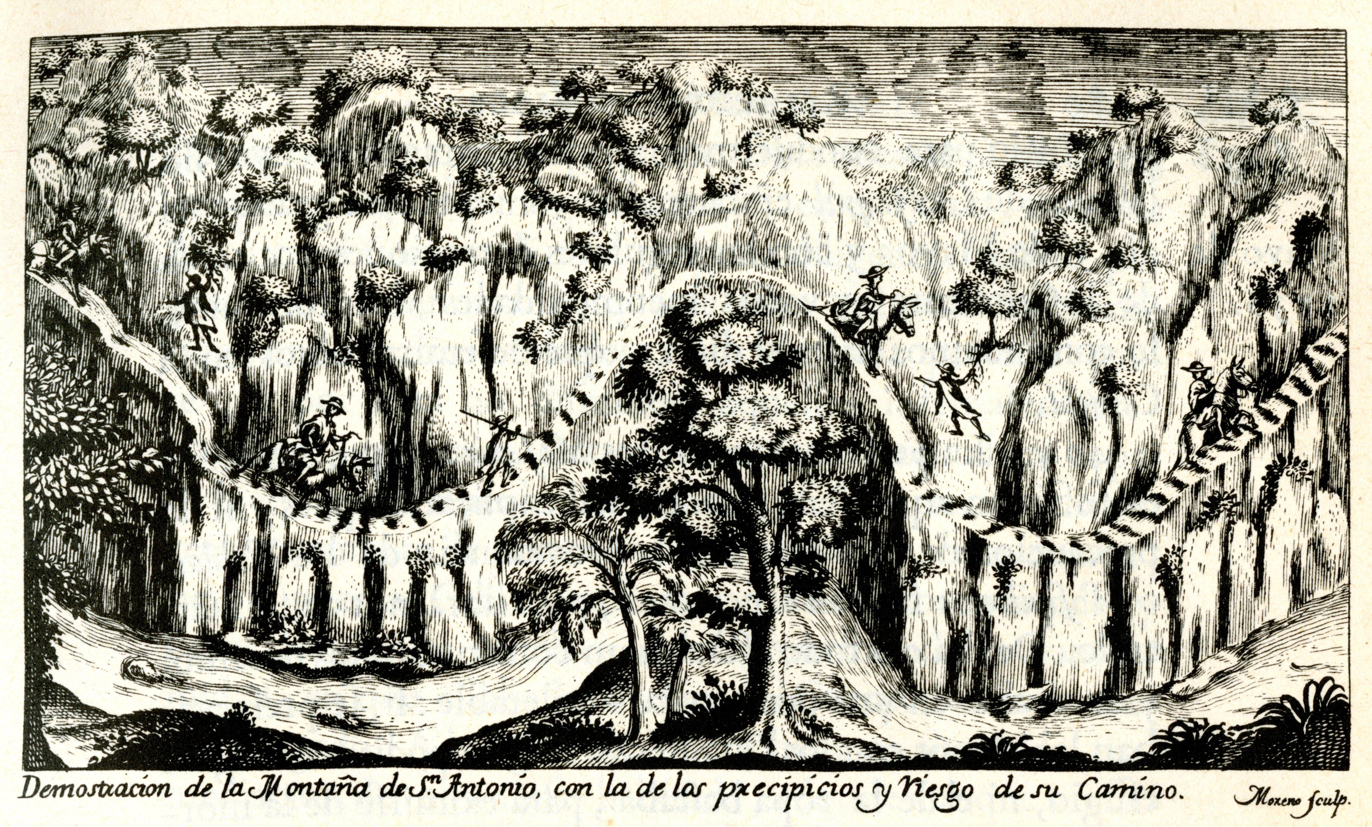 De Ulloa, Antonio y Jorge Juan. Relación Histórica del Viaje a la América Meridional, hecho de Orden de Su Majestad Católica para medir algunos Grados de Meridiano Terrestre, y venir por ellos en conocimiento de la verdadera Figura y Magnitud de la Tierra, con otras varias Observaciones Astronómicas y Físicas. Por Don Jorge Juan Comendador de Aliaga, en la Orden de San Juan, Socio correspondiente de la Real Academia de las Ciencias de París; y Don Antonio de Ulloa de la Real Sociedad de Londres: ambos por Capitanes de Fragata de la Real Armada. Primera Parte / Tomo I. Impresa por la Orden del Rey Nuestro Señor en Madrid por Antonio Marín, Año de MCDDXLVIII (1748). Diapositiva de Consulta y acceso publico cuya información fue investigada de un libro y/o ejemplar de revisión custodiado en los Fondos Bibliográficos (Sección Siglo XVIII o Etapa Colonial) del Archivo Histórico del Guayas; Guayaquil, Ecuador.Consultado y compartido por el usuario J. Javier García A.